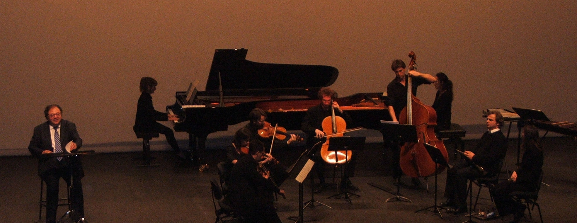 Frédéric Lodéon accompagné de l'Orchestre National des Pays de la Loire sur la scène du PCC au Mans pour le festival "Les Automnales" le 24 Octobre 2009.